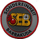 Badge der Sondereinheit Barrakuda